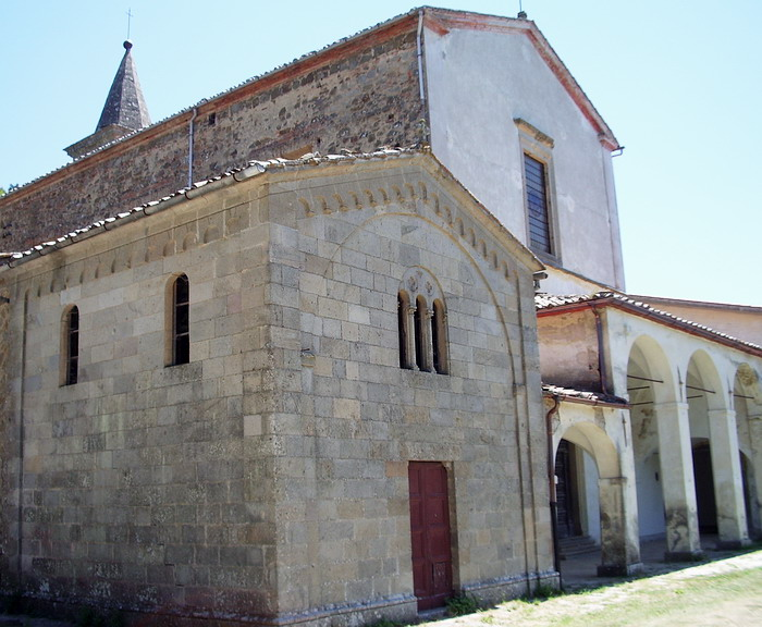 Convento della Santissima Trinità alla Selva (GR), foto 13/07/2007